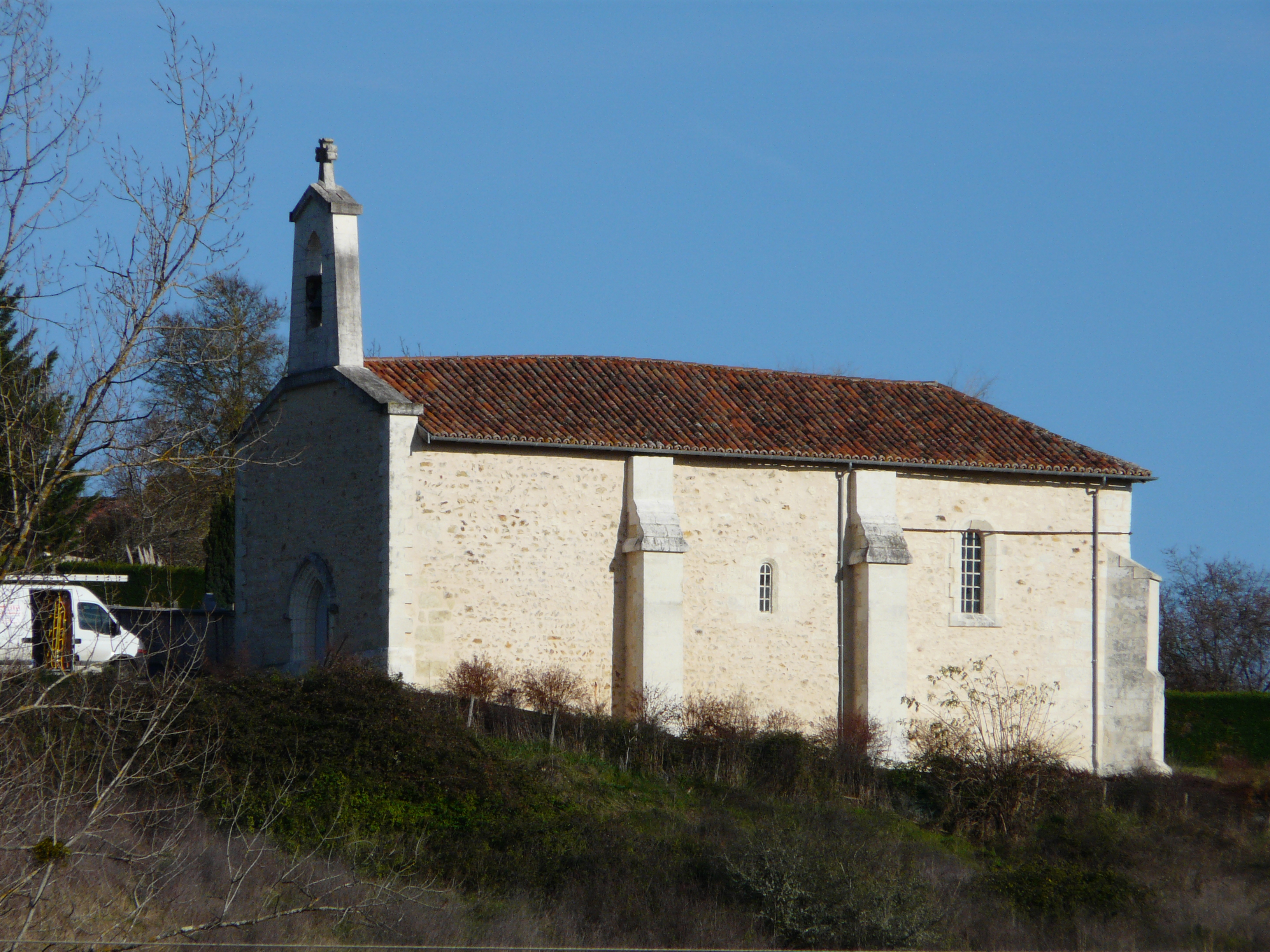 L'église Saint-Séverin, Saint-Séverin-d'Estissac, Dordogne, France.